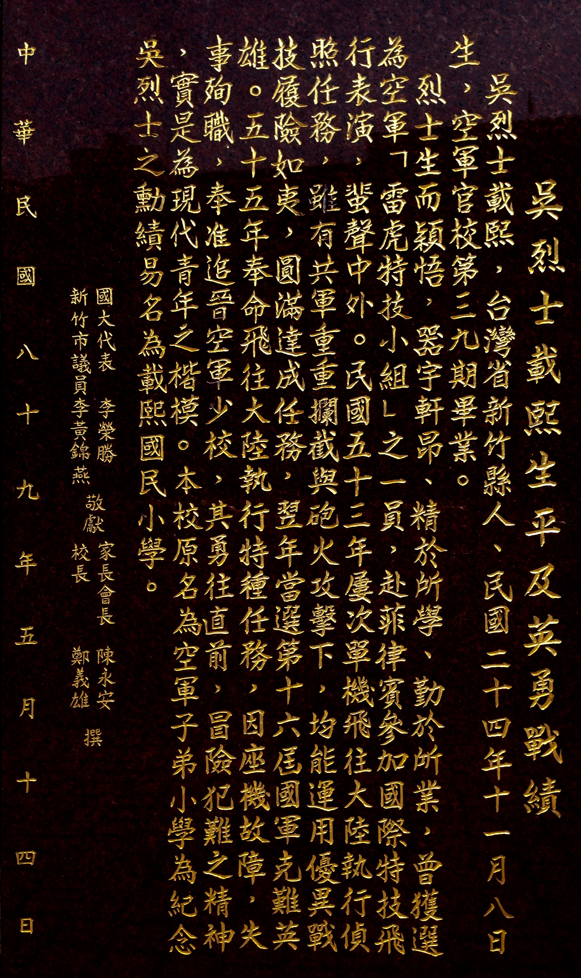 中文（台灣）: 吳載熙銅像碑文